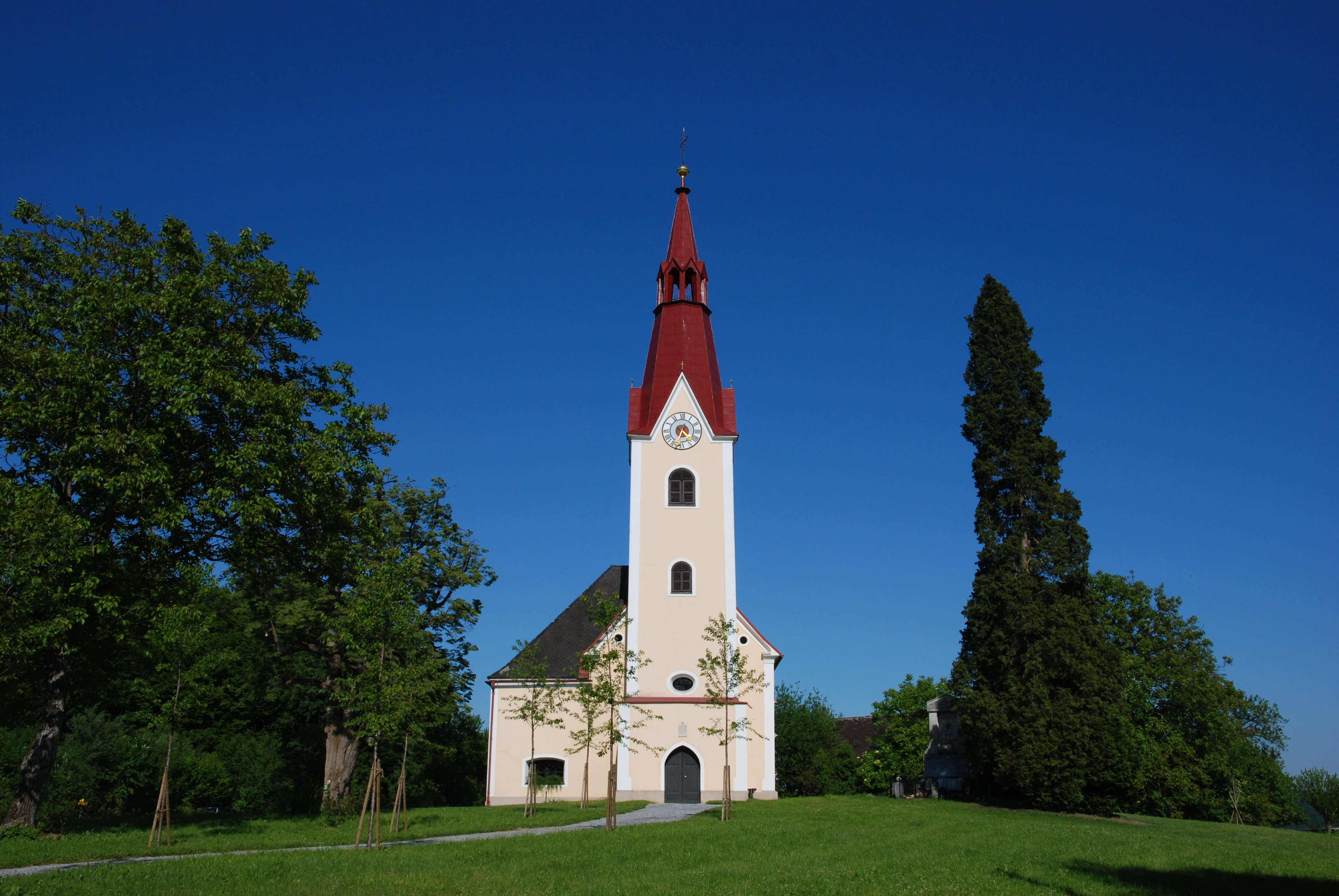 Kath. Filialkirche hl. Sebastian am Saazerkogel